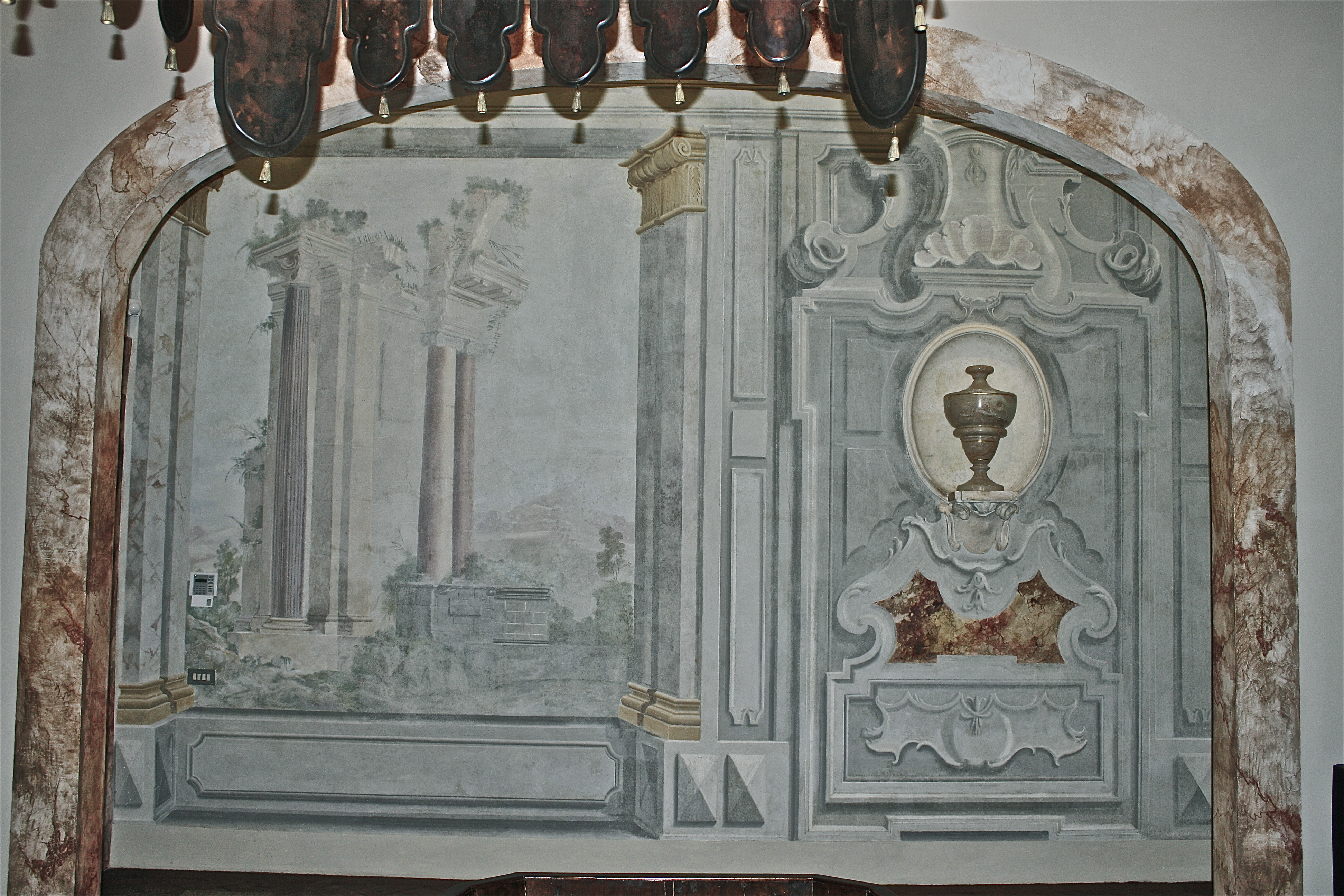 Palazzo dami, galleria